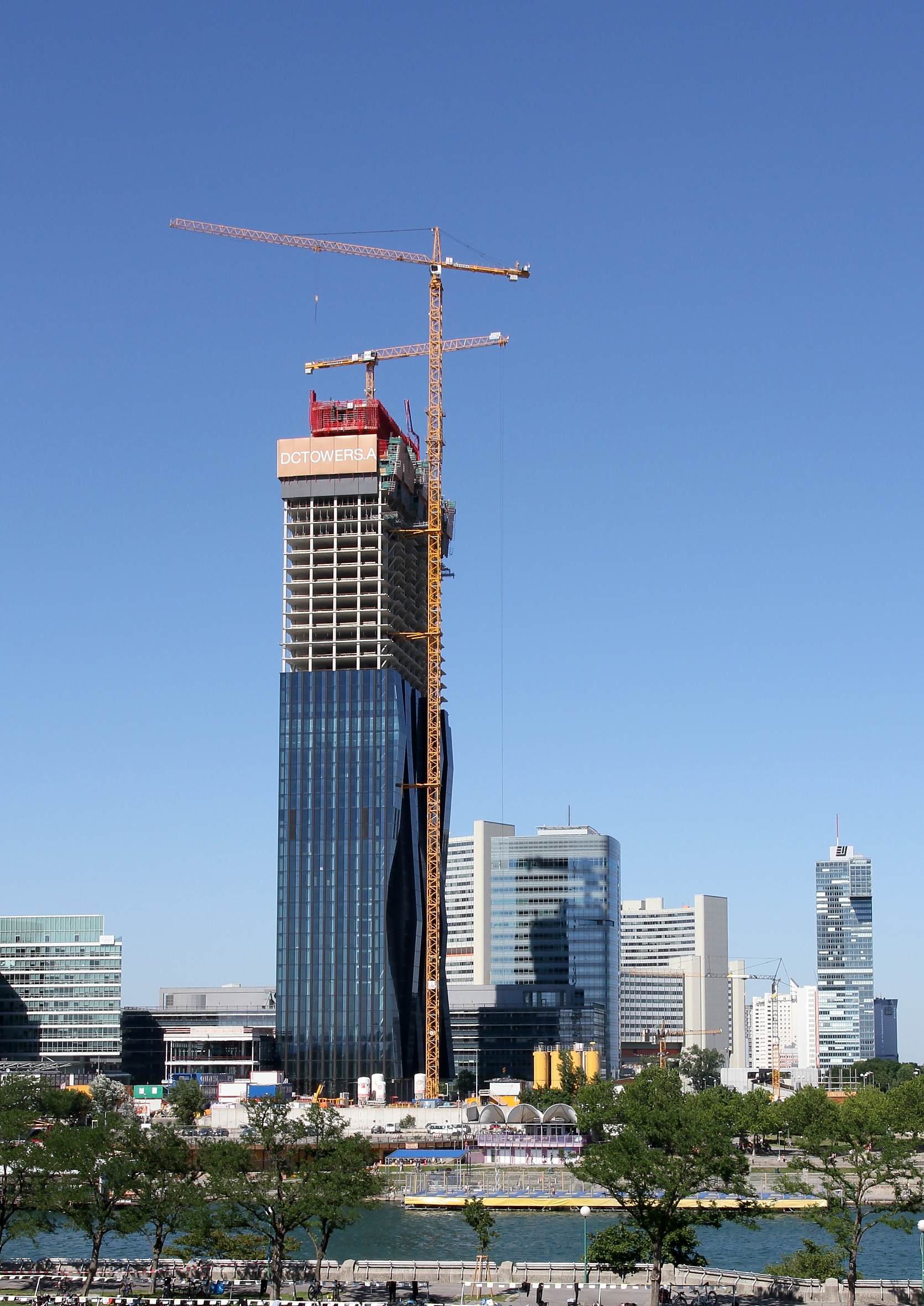 Der DC Tower in der Bauphase (Sommer 2012). Südwestansicht von der Donauinsel, Höhe Reichsbrücke.